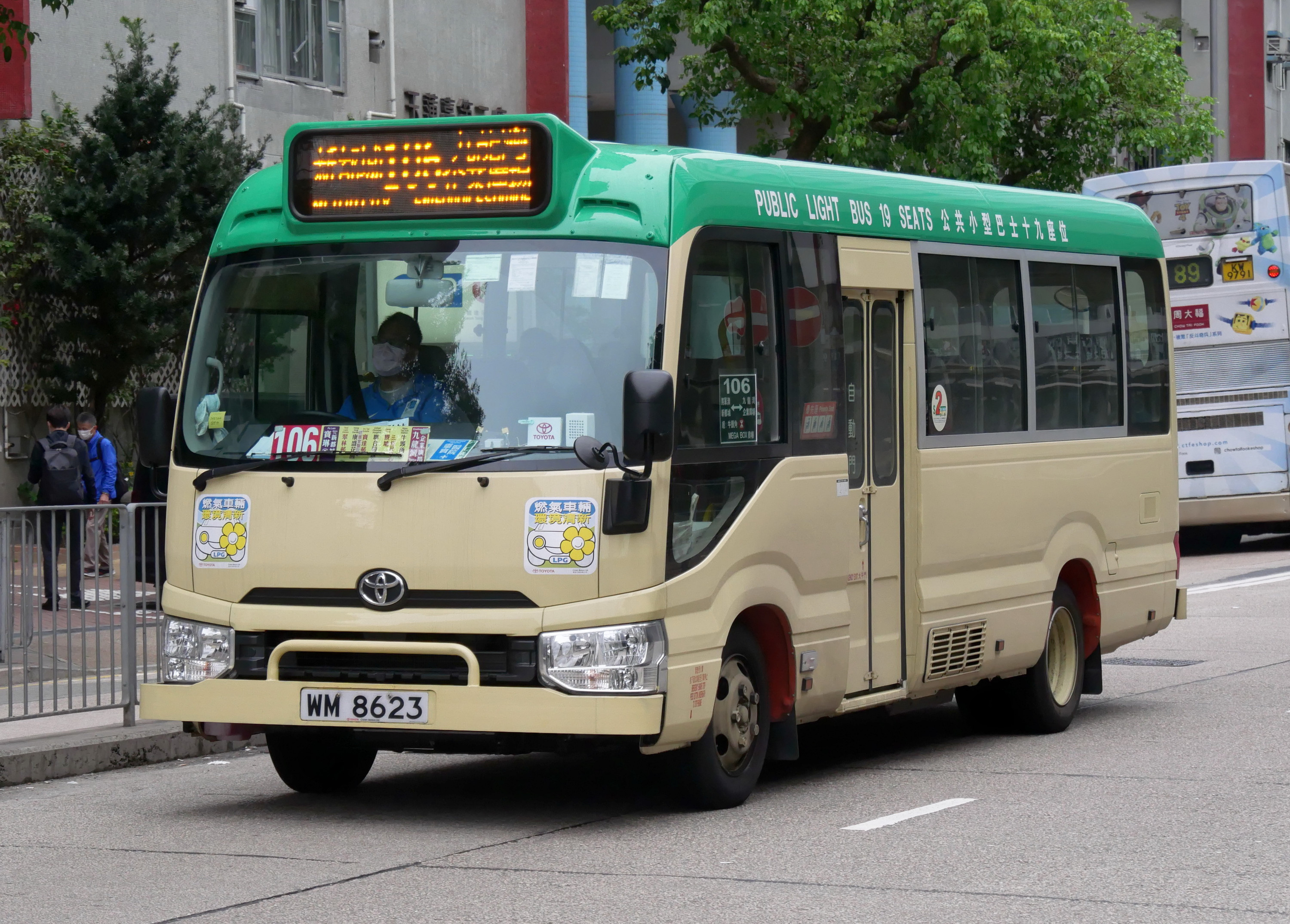 中文（中国大陆）: 小巴WM8623的照片